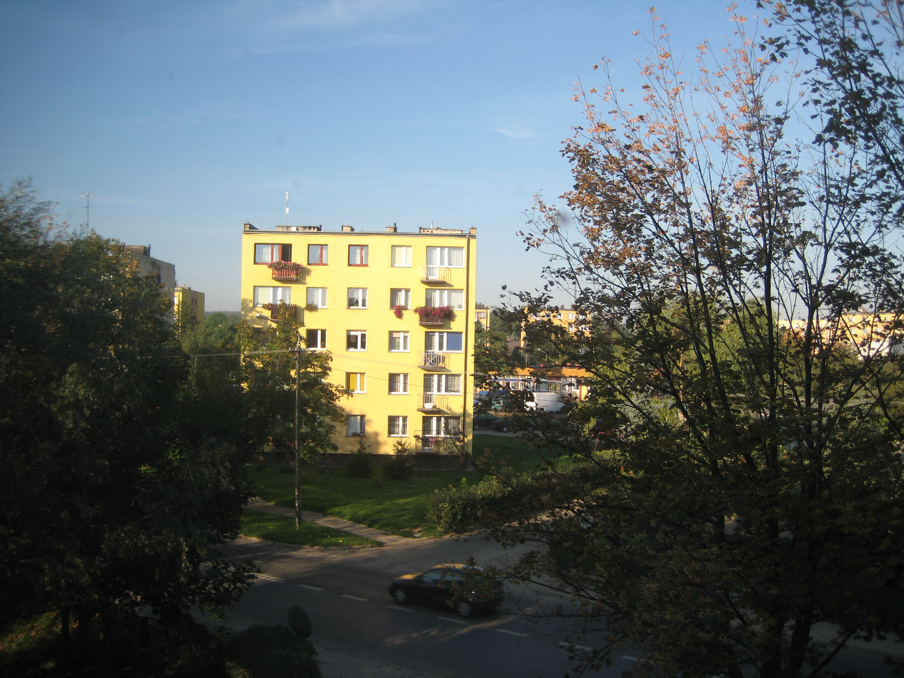 Zabudowa w Przysusze